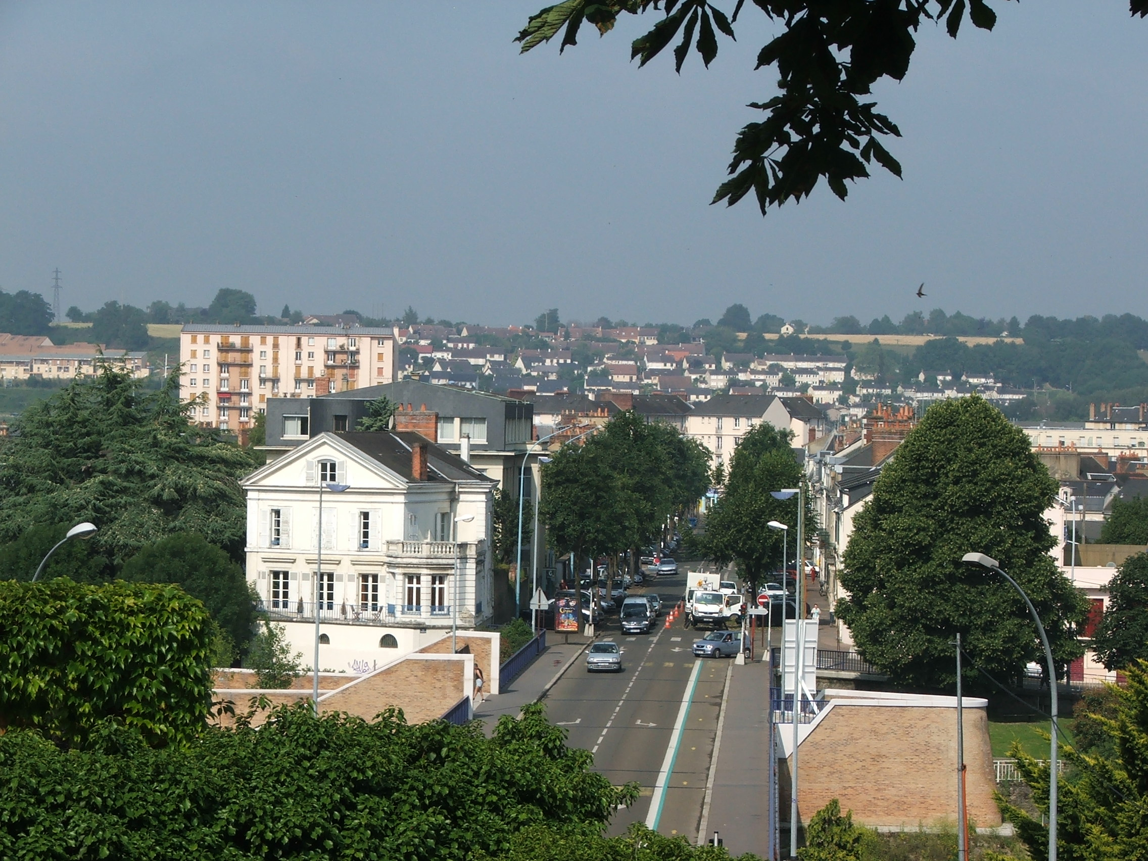 Le quartier Saint-Georges avec le pont de Fer et le boulevard Anatole France